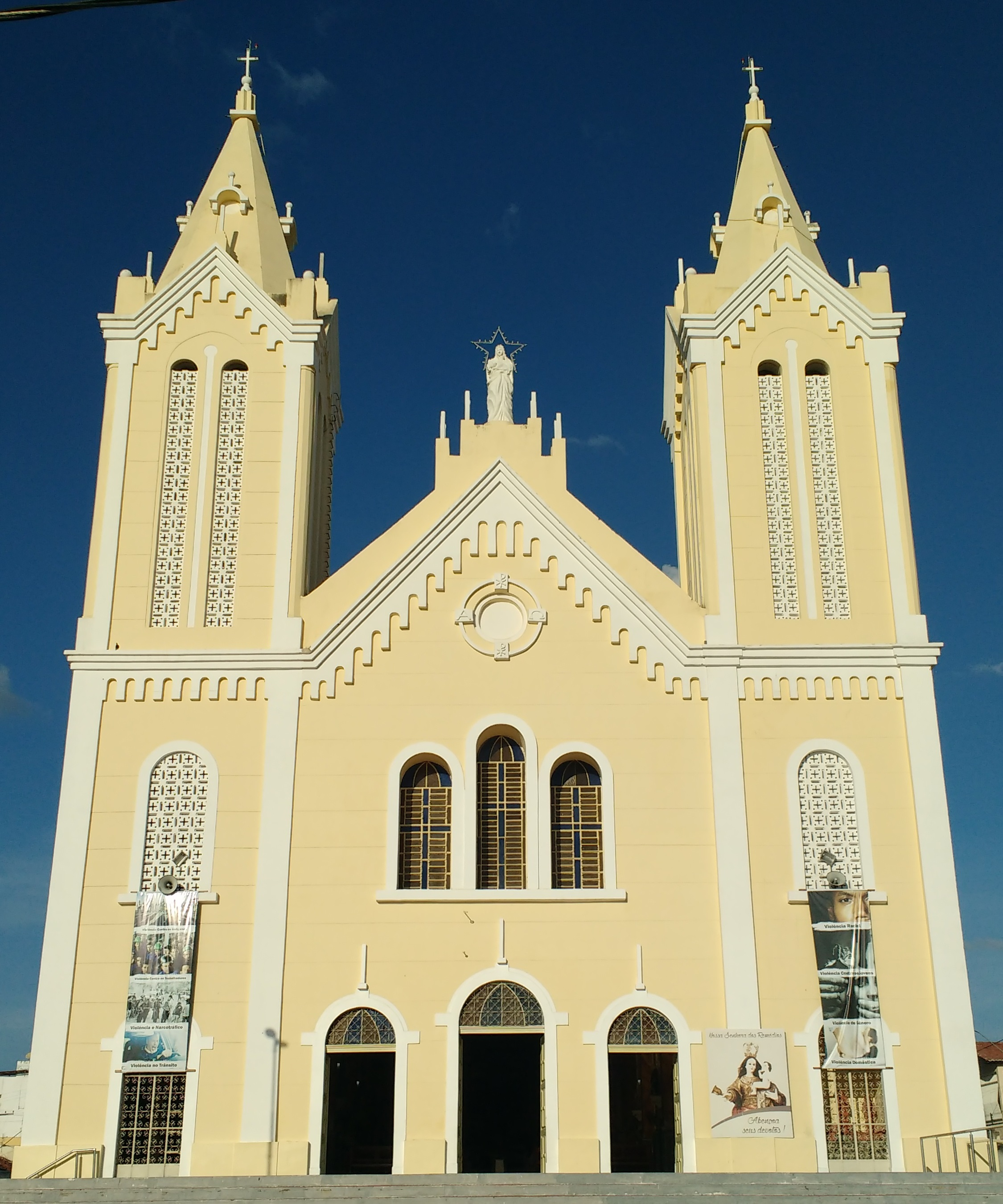 Igreja Matriz de Nossa Senhora dos Remédios, da diocese de Cajazeiras, em Sousa, Paraíba (Brasil)